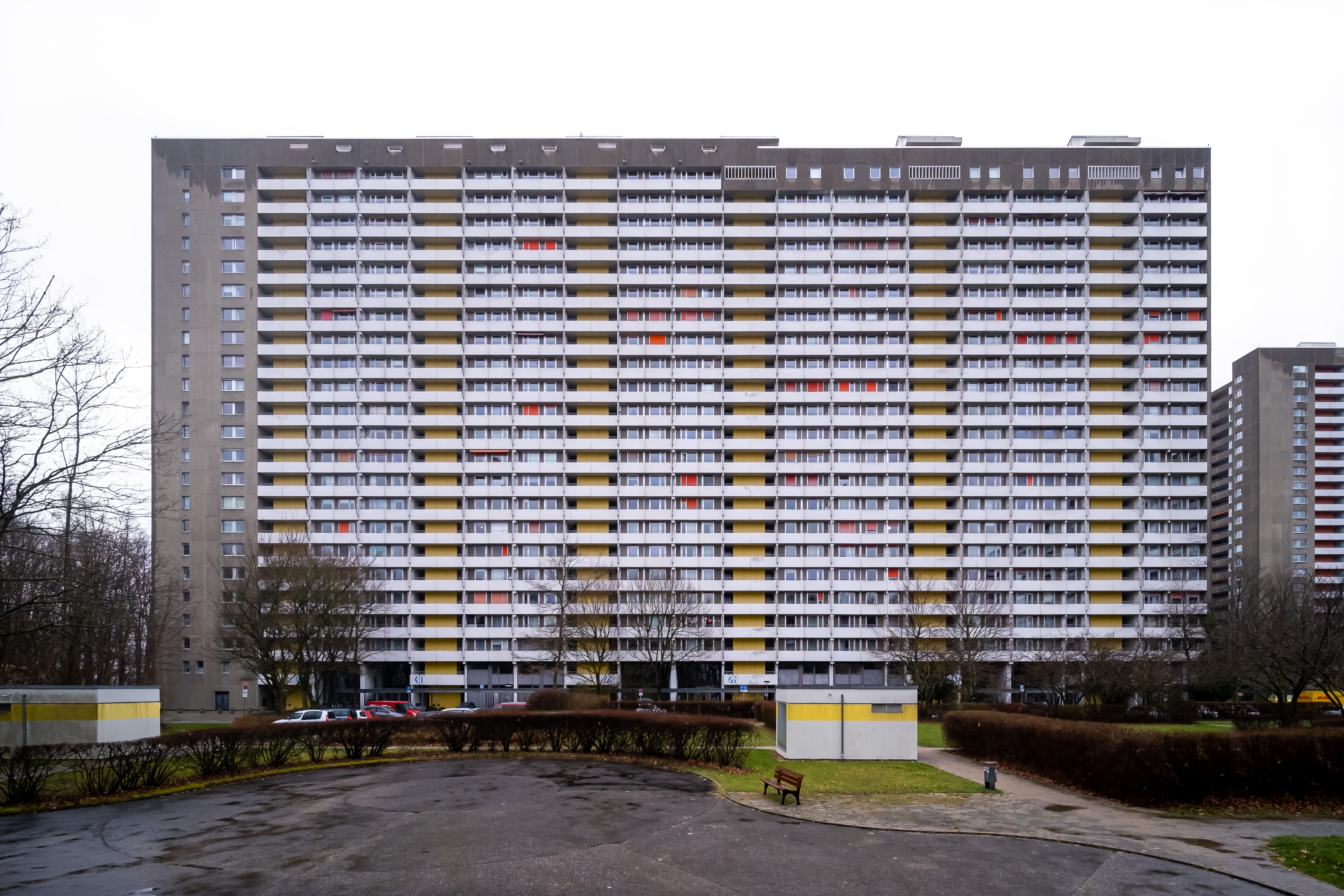 Asemwald